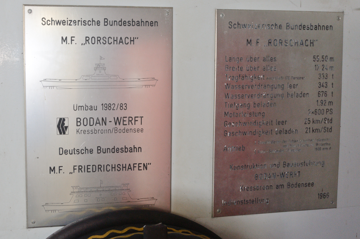 Fabrikschild der Bodenseefähre Friedrichshafen, gebaut als MF Rorschach